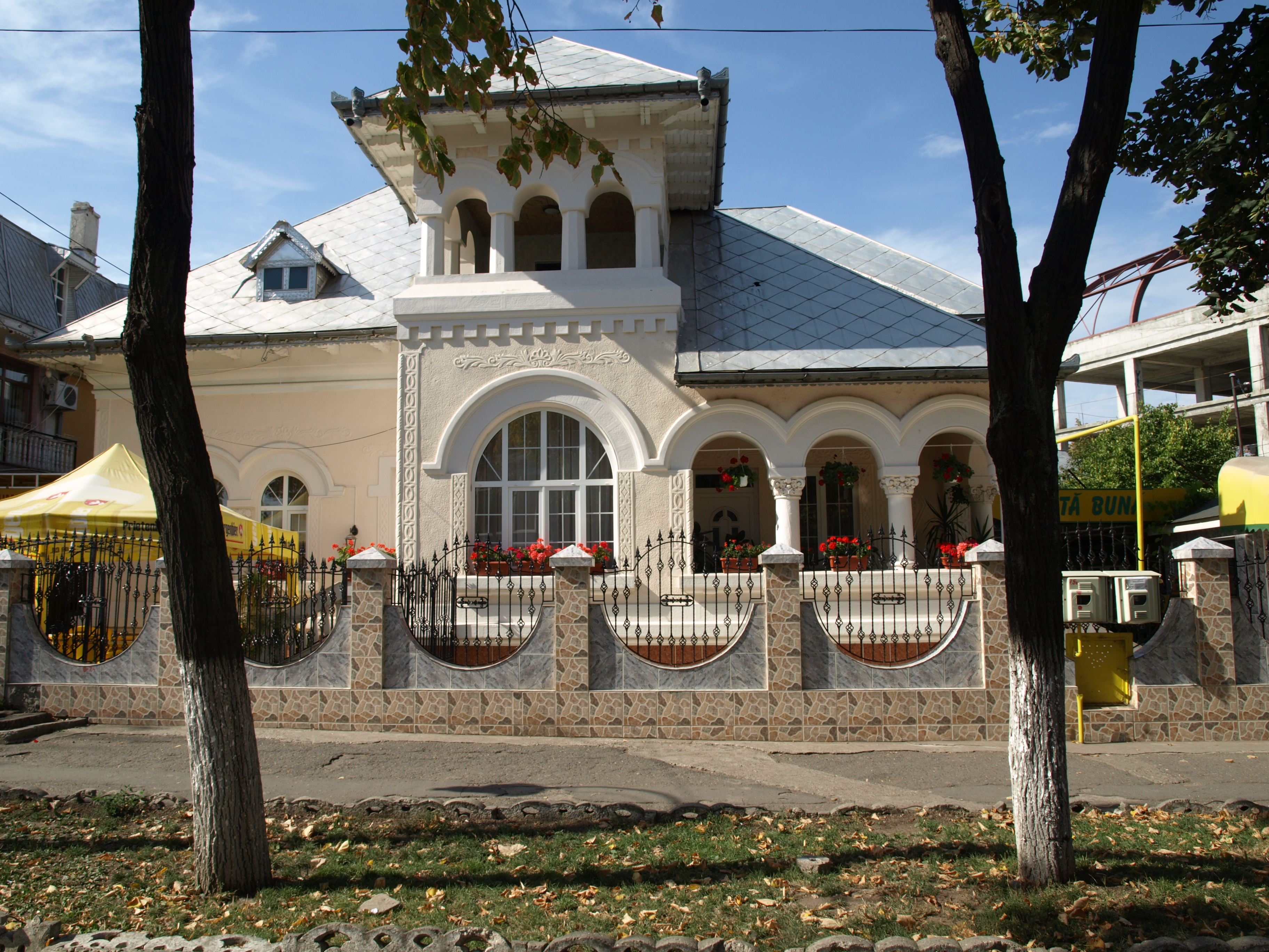 Casa Vasile Beldie